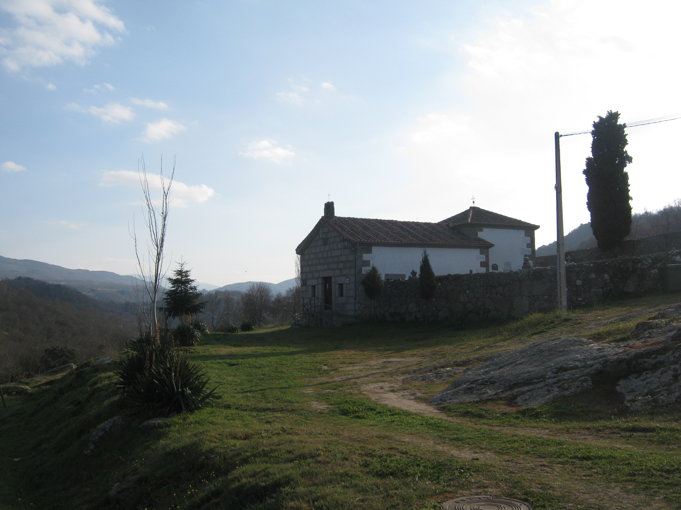 Ermita del Cristo de la Misericordia (La Calzada de Béjar, Salamanca, España)